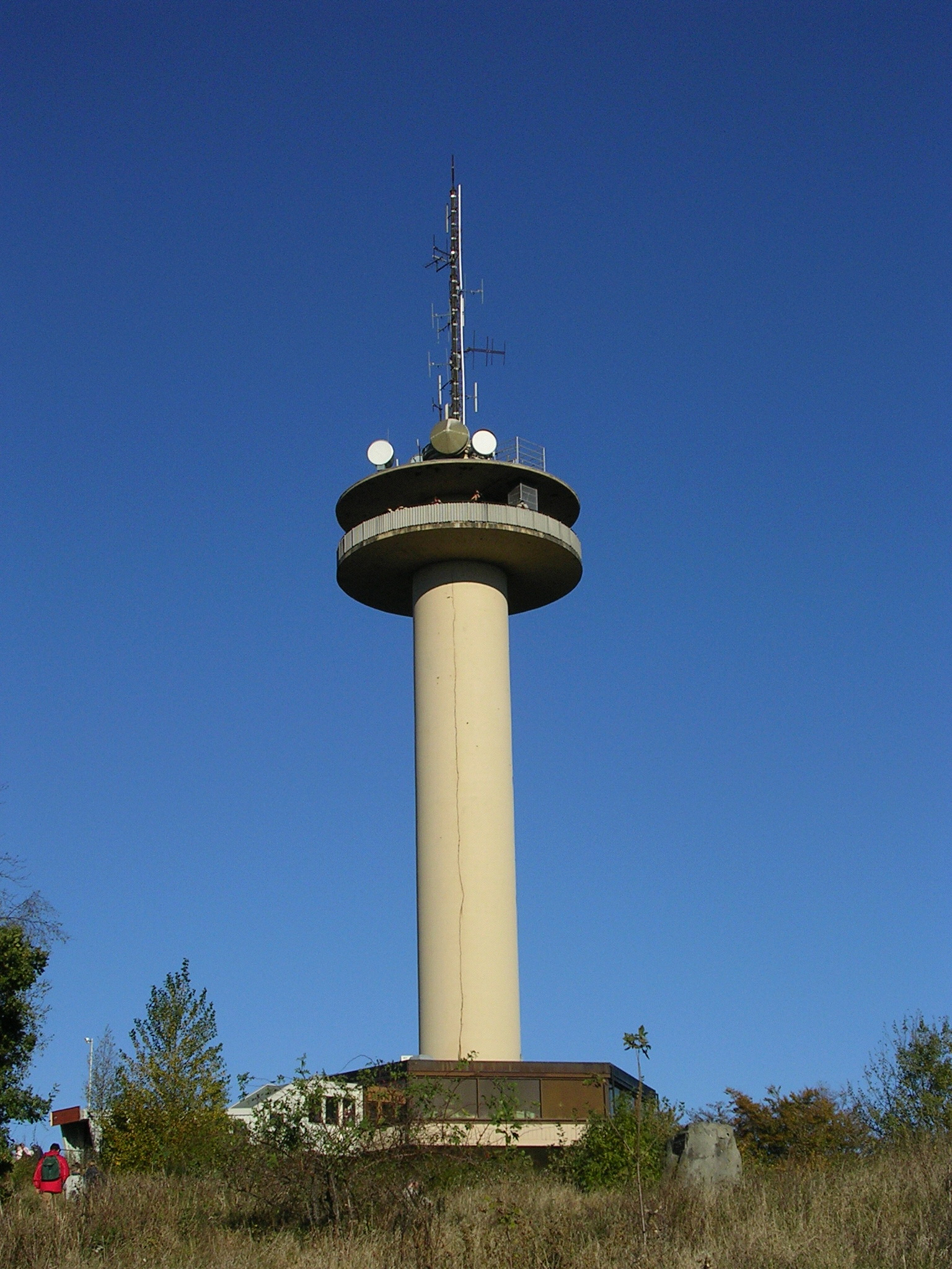 selbst fotografiert